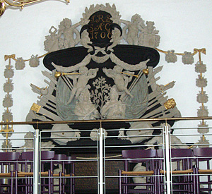 Odder Kirke - Rodstenkapellet